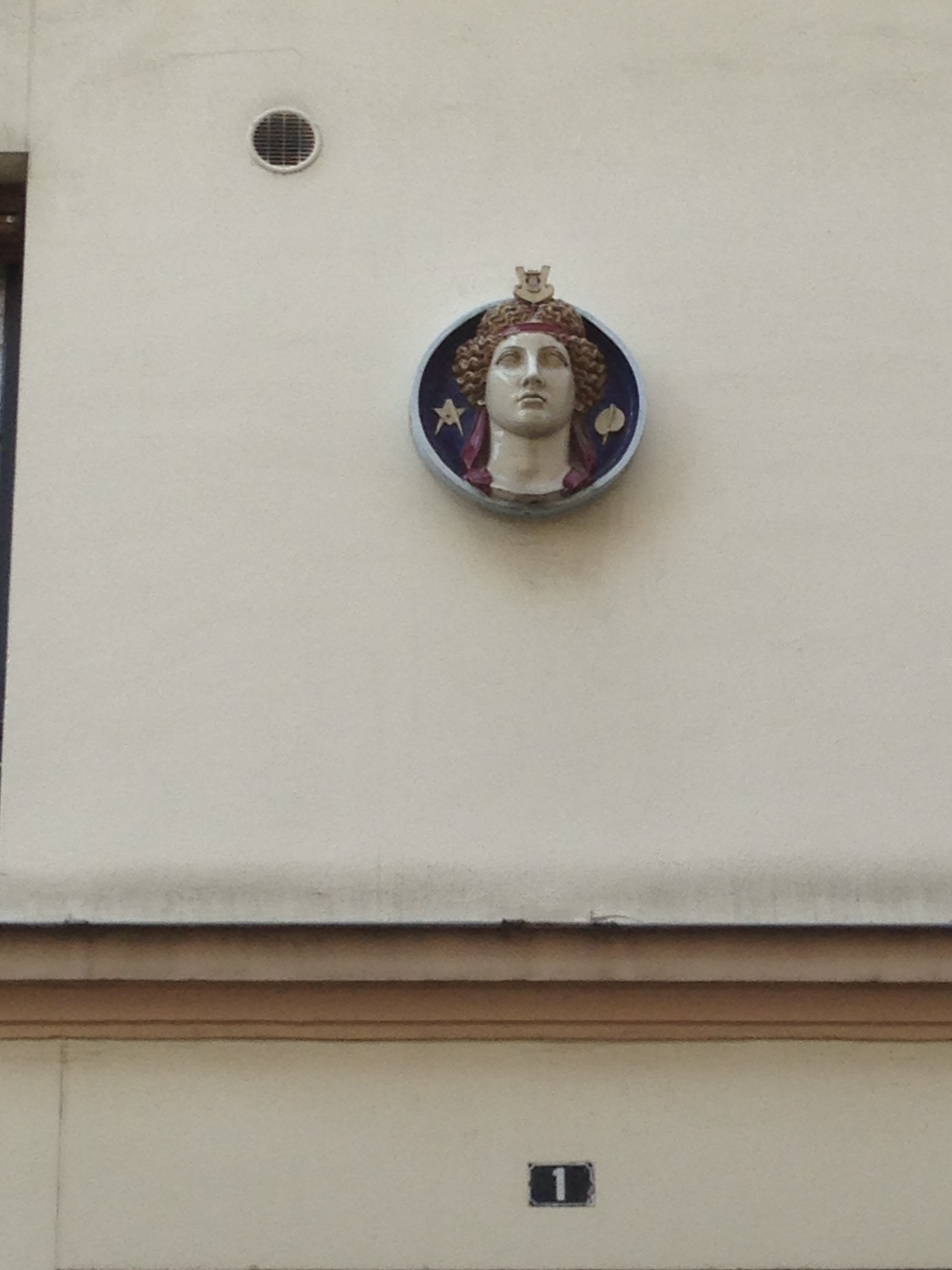 Médaillons sur la façade du 1, rue Rubens, Paris 13e